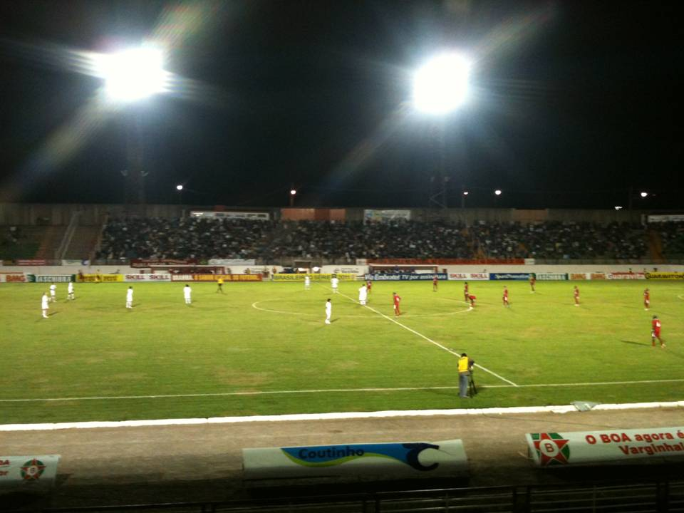 Boa Ec Melão